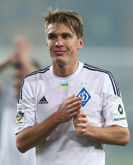 16.10.2015 г.Киев. НСК "Олимпийский". 11-й тур Лиги Пари-Матч. Динамо Киев - Шахтер Донецк - 0:3